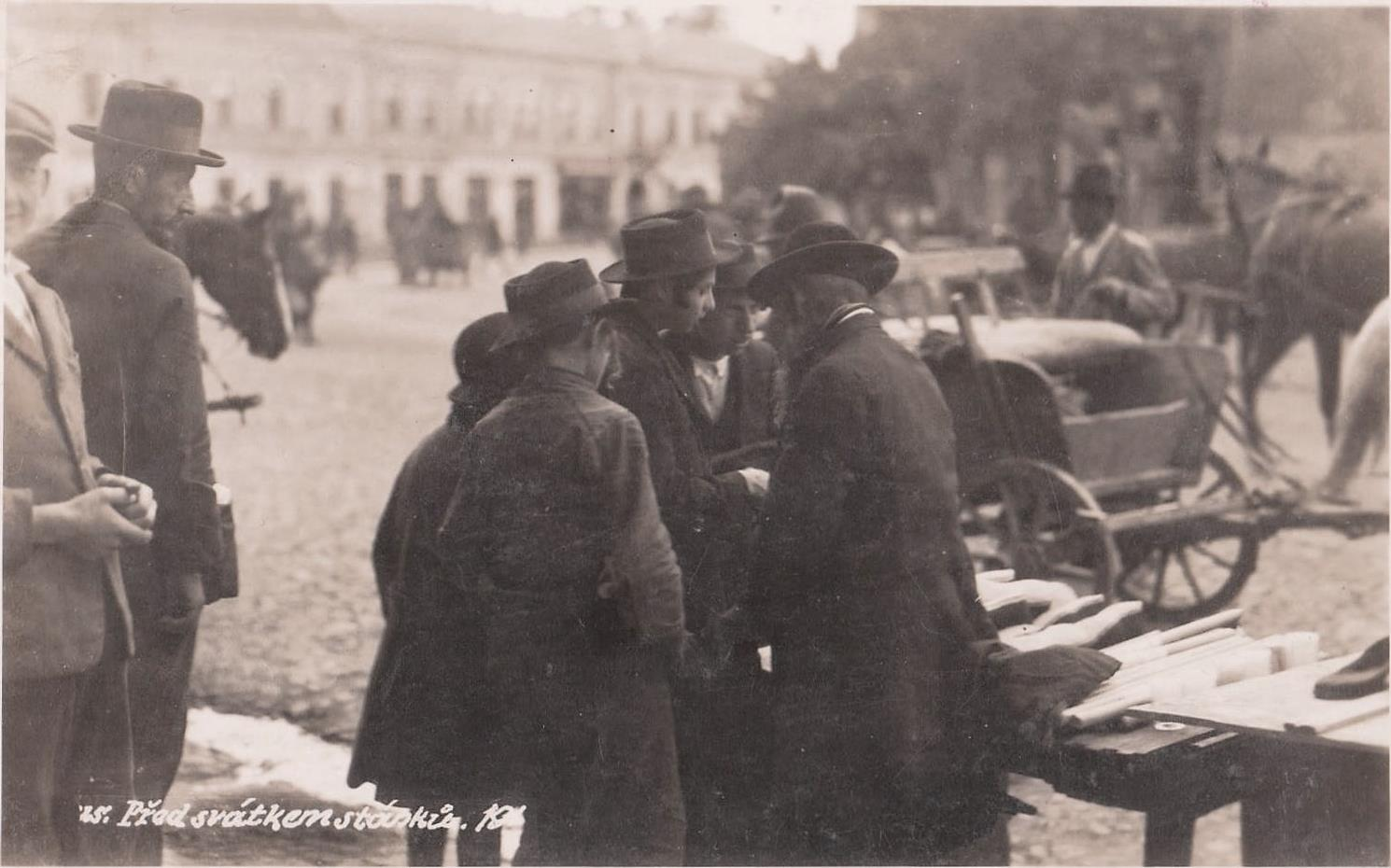 Ортодоксальные евреи в Ужгороде.